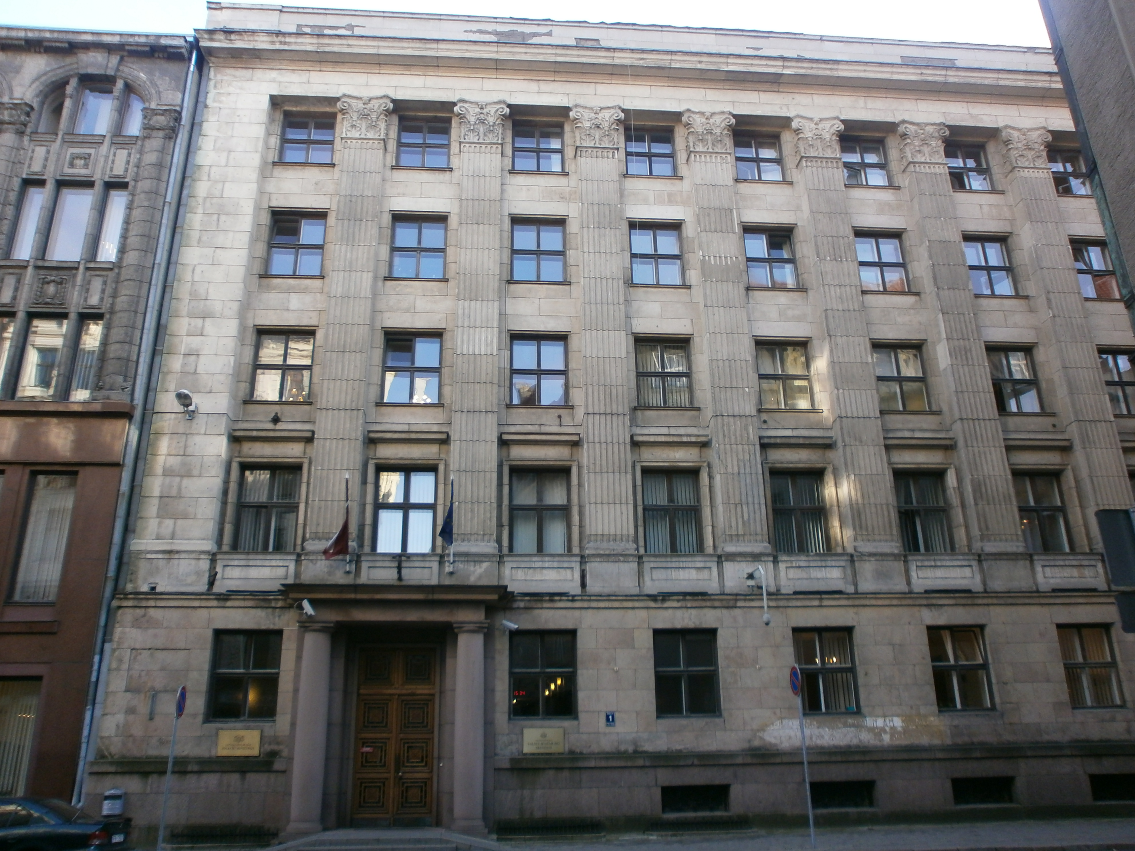 Министерство финансов Латвии